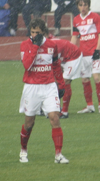 Александр Шешуков в составе Спартака